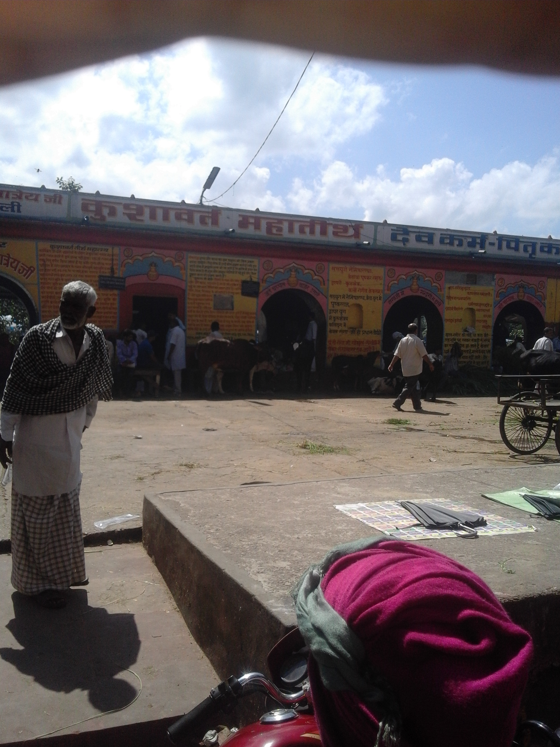 नेपाली: कुशावर्त घाट हरिद्वार